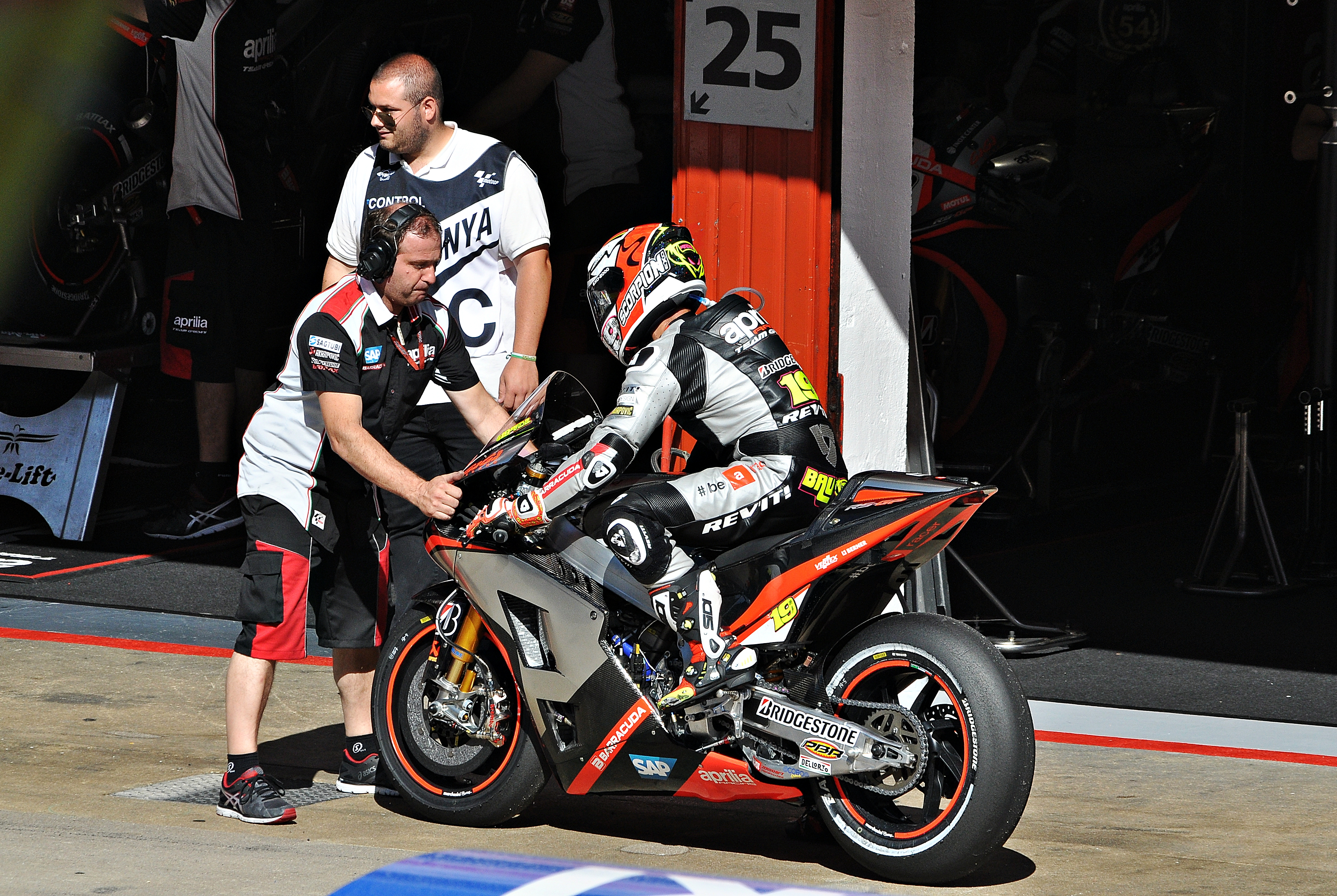 Gran premio de Cataluña